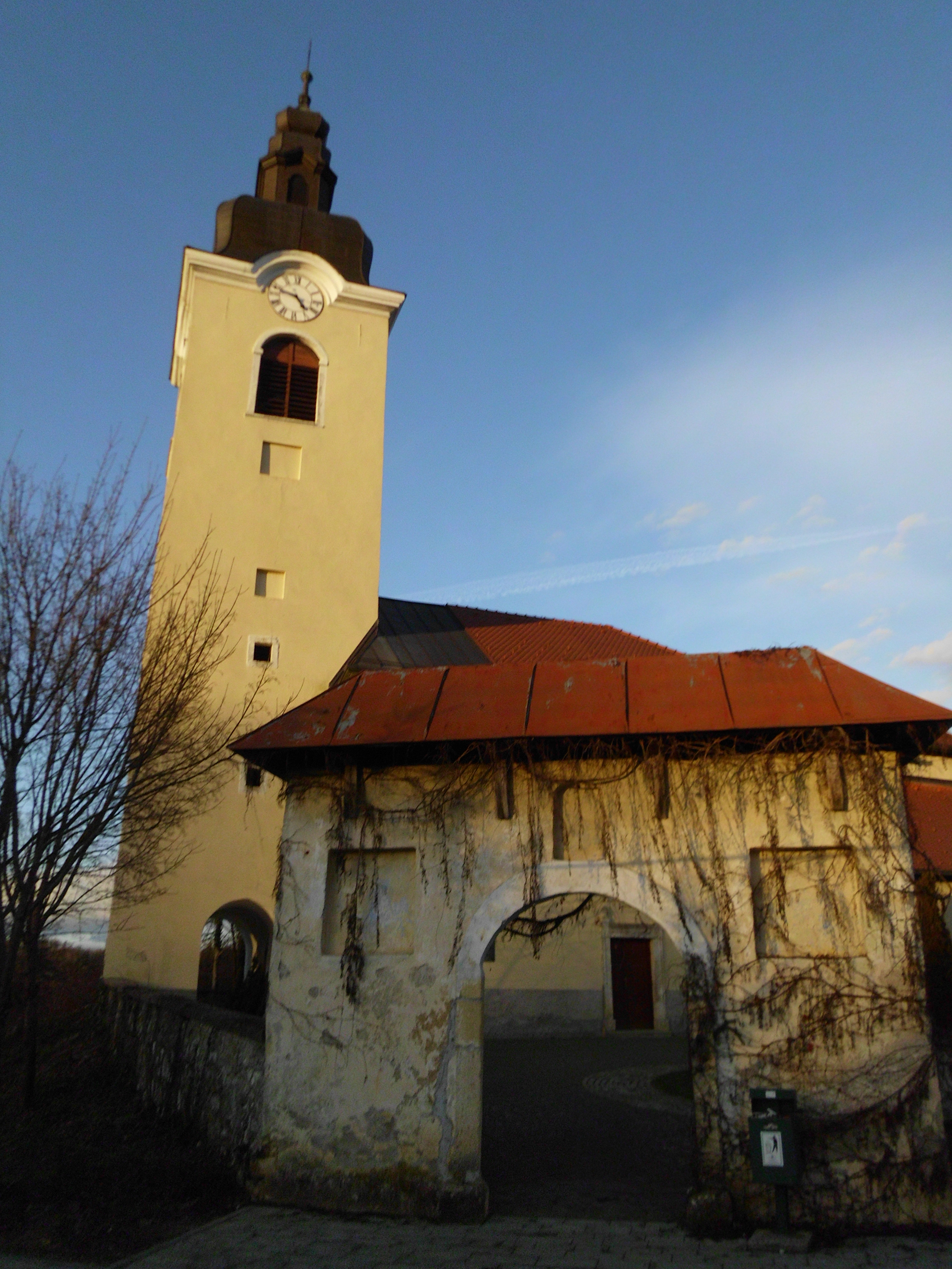 Frontansicht der Kirche Sveti Vid in Ozalj